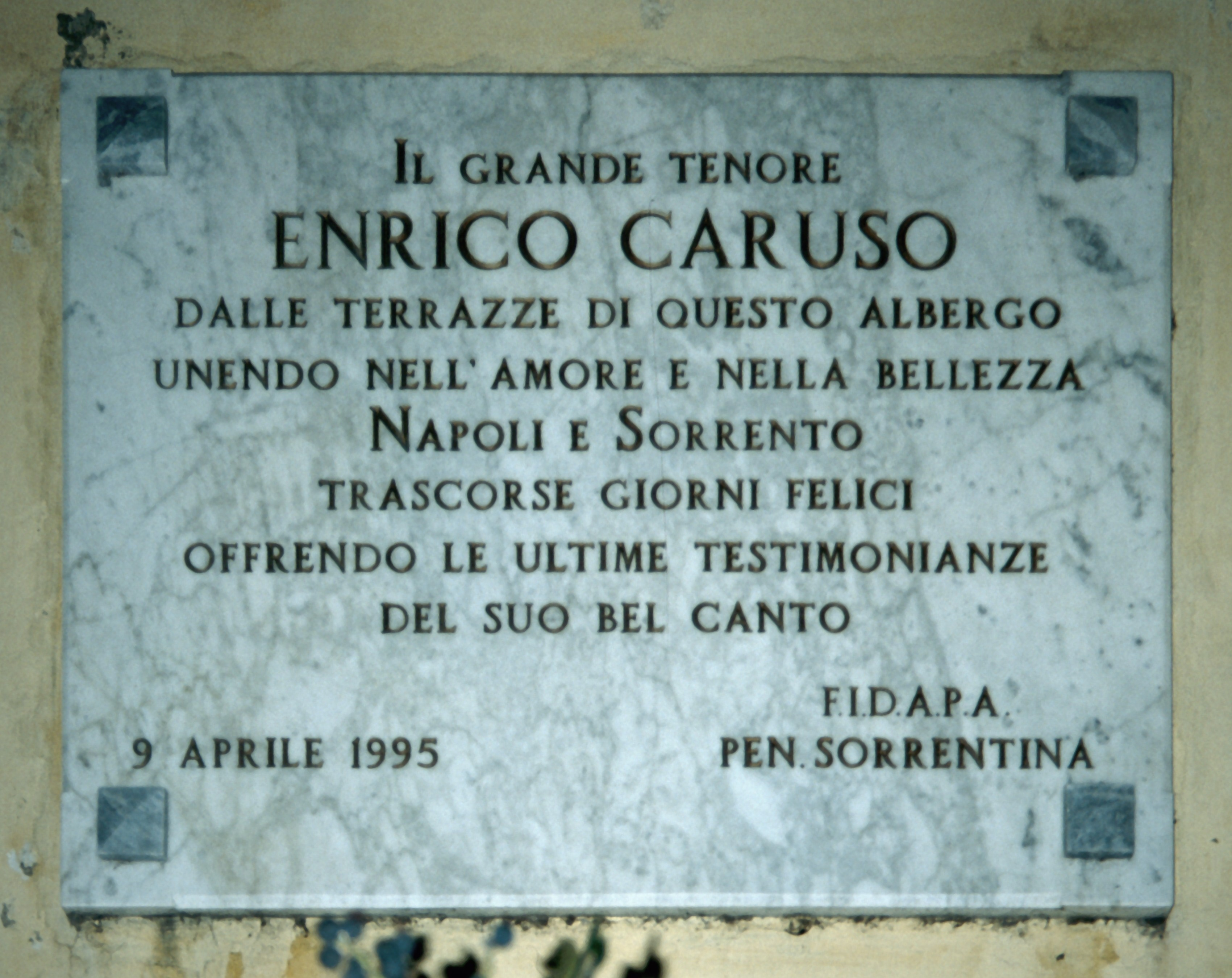 Gedenktafel für den italienischen Tenor Enrico Caruso (1873–1921) in der Altstadt von Sorrento, Provinz Neapel, Italien "Il grande tenore Enrico Caruso - Dalle Terrazze di questo albergo unendo nell'amore e nella bellezza napoli e sorrento trascorse giorni felici offrendo le ultime testimonianze del suo bel canto."